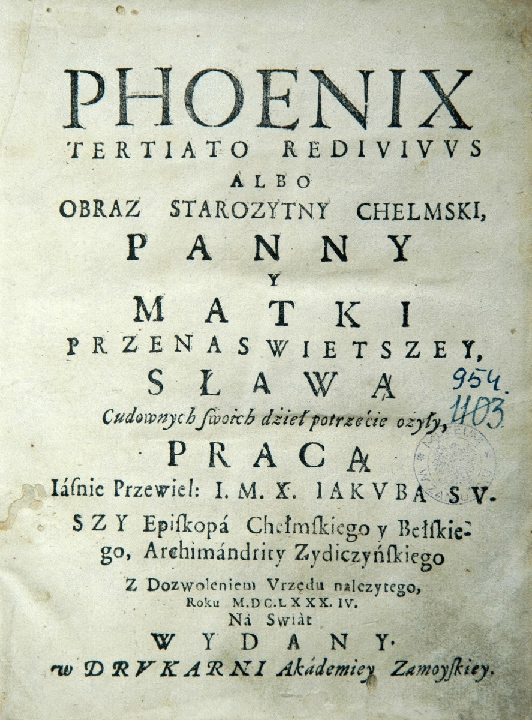 Jakub Susza, Phoenix tertiato redivivus albo obraz starożytny chełmski Panny i Matki Przenaświętszej, Zamość 1684, karta tytułowa